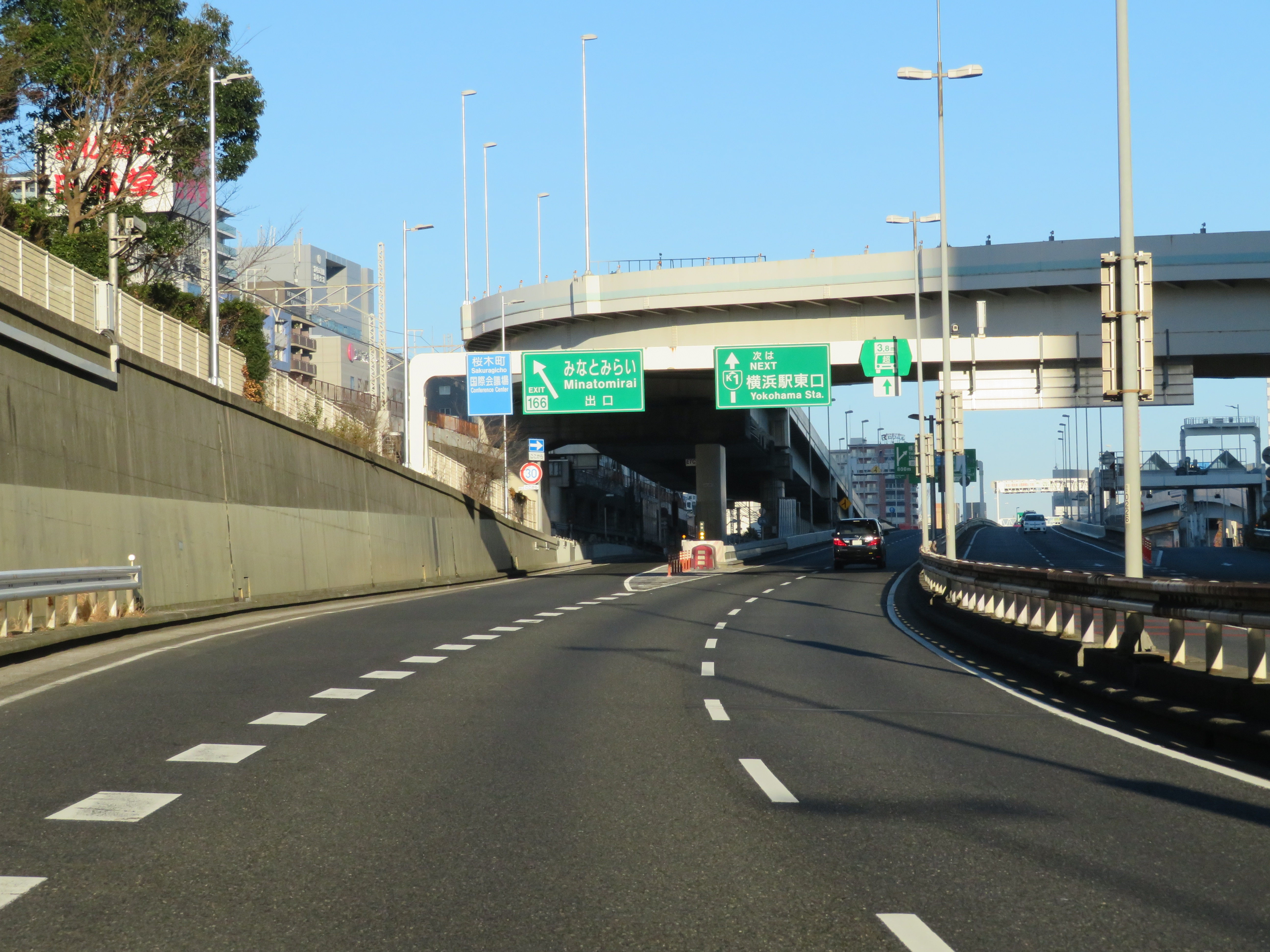 都高速道路神奈川1号横羽線みなとみらい出入口（上り出口付近）